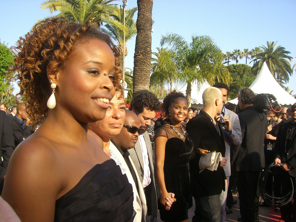 Roberta Rodrigues, à frente; Cintia Rosa, sorrindo ao fundo.